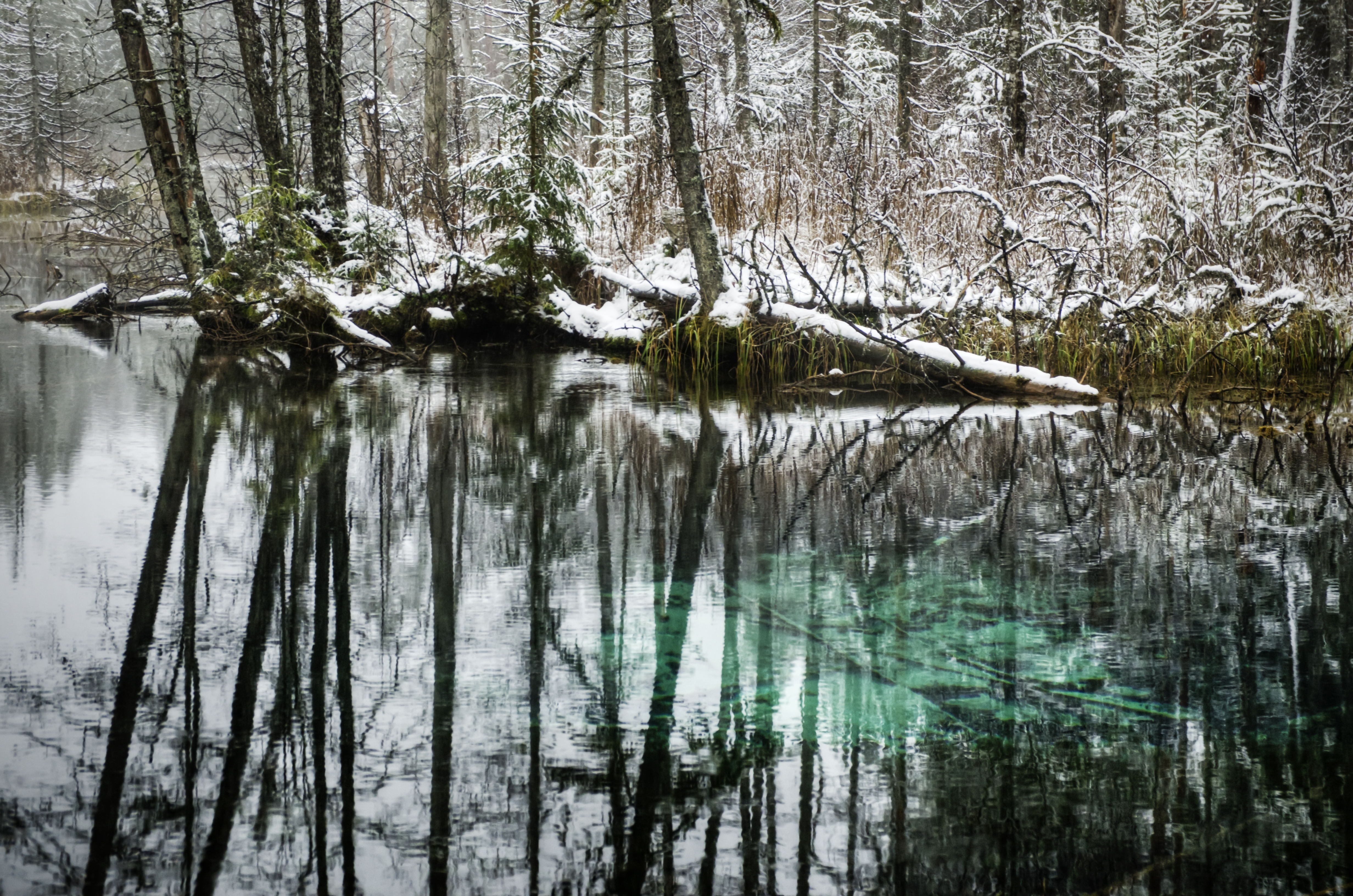 Talvine Vilbaste siniallikas Võllinge oja põhjas